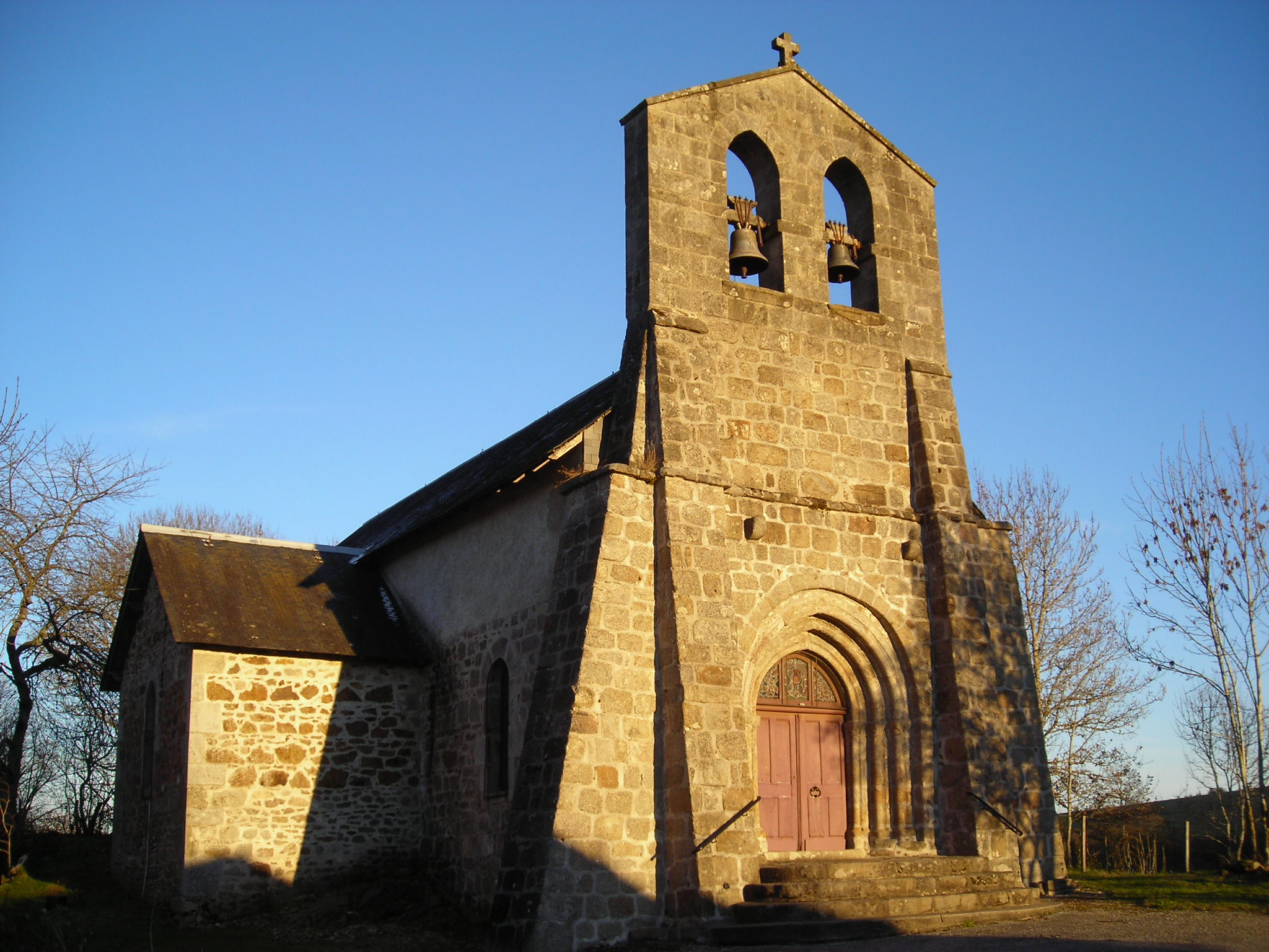 feyts eglise 5477422